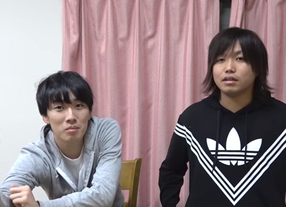 トミーが女子高生なのかどうか聞いてみた